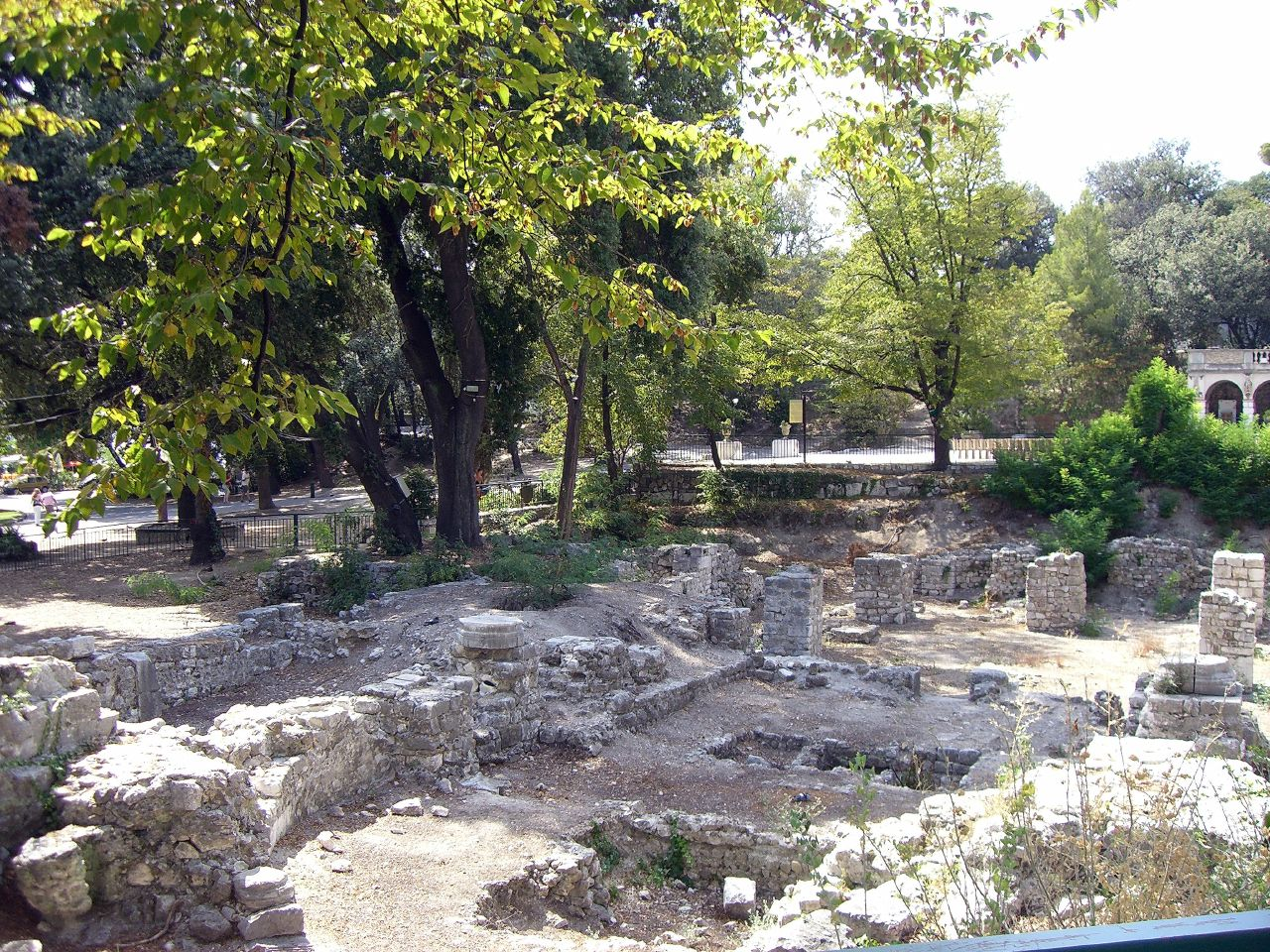 Ruines de la première cathedrale de Nice.